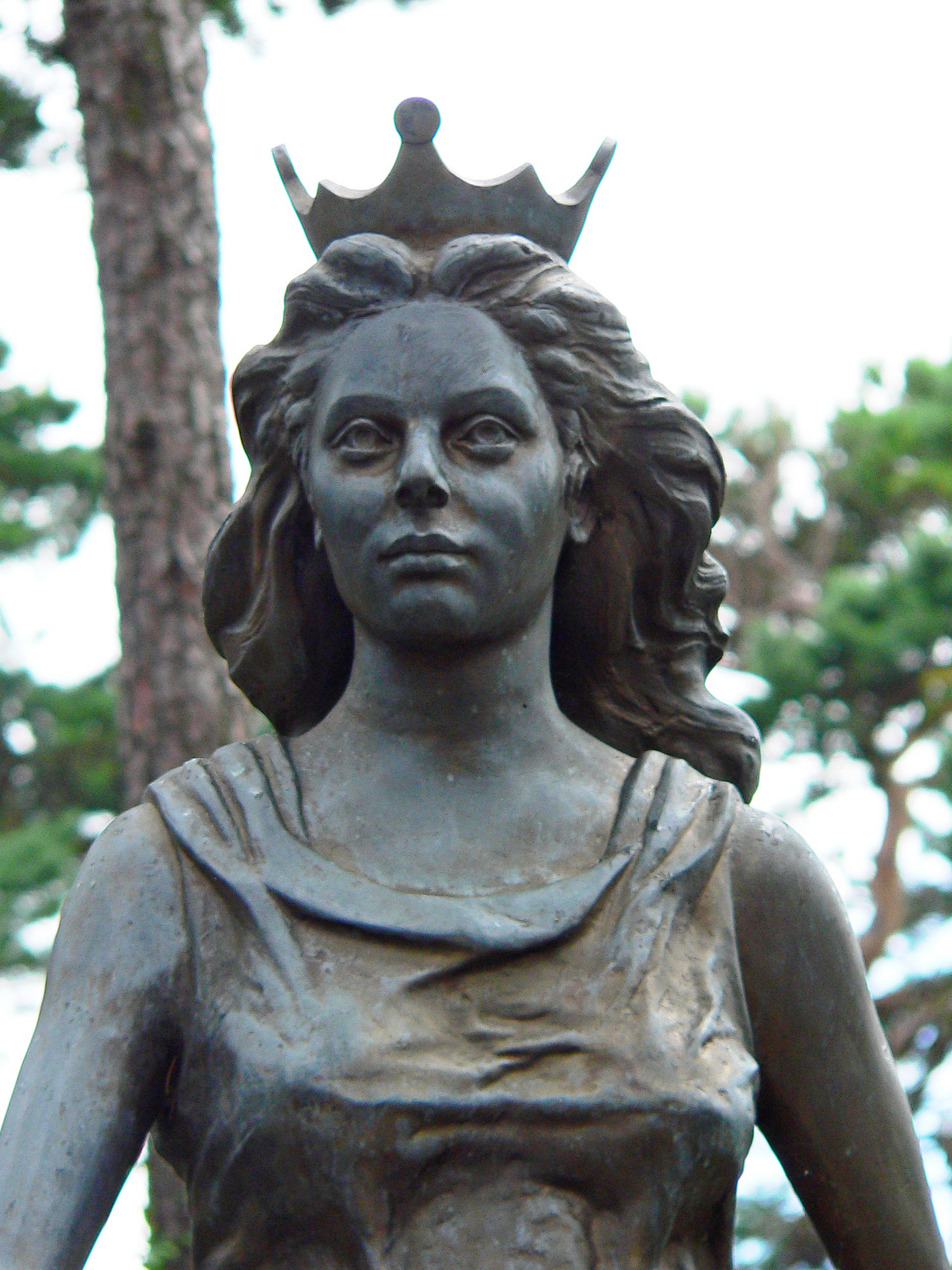 Zbliżenie figury bogini Juraty w miejscowości Jurata (Jastarnia).